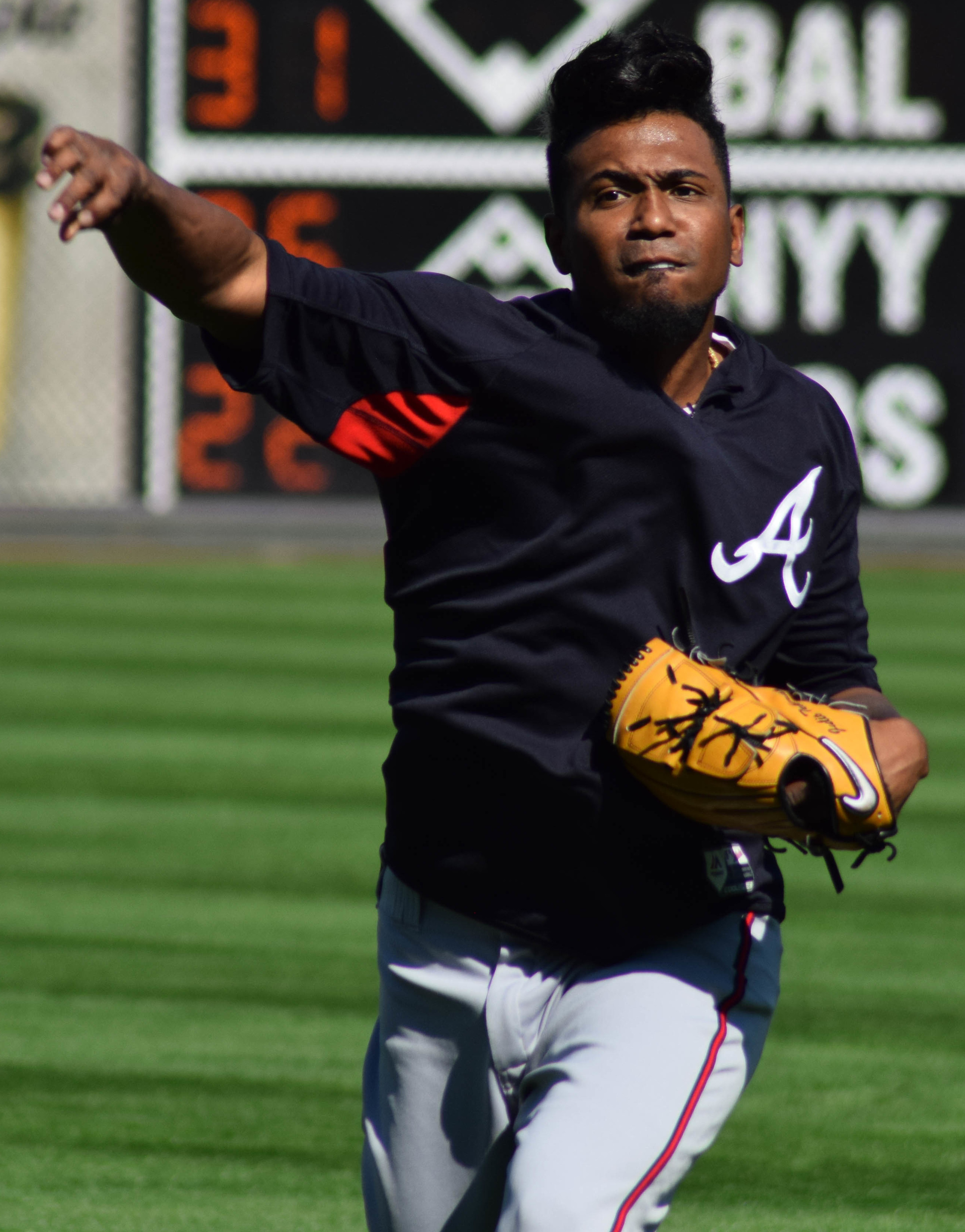 Julio Teheran